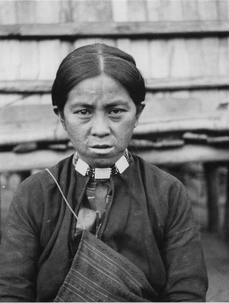 鳥居龍藏所攝紋面泰雅族女人